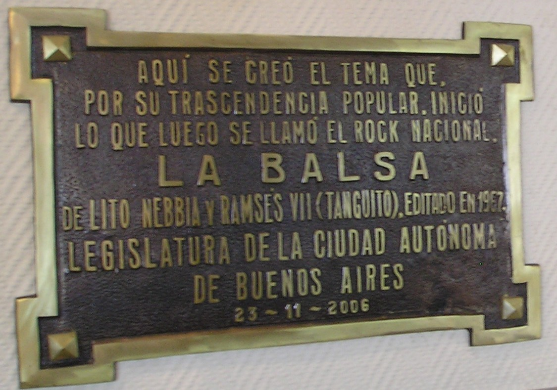 La Perla del Once. Esquina de las avenidas Rivadavia y Jujuy (barrio Once). Buenos Aires. Lugar donde se compuso La Balsa (Litto Nebbia y Tanguito). Placa colocada en el pasillo que lleva a los baños.